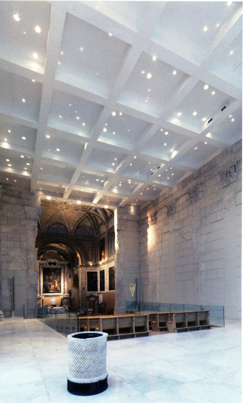 Tempio romano e Basilica Cattedrale di San Procolo martire di Pozzuoli